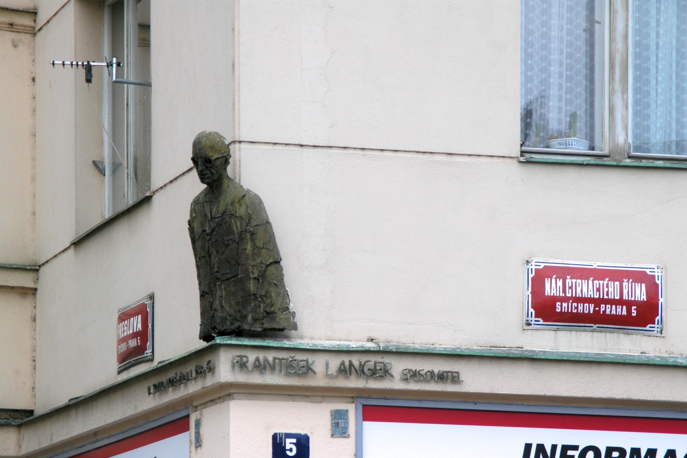 Praha, Smíchov - busta Františka Langera na rohu Preslovy ulice a náměstí 14. října, autor: Kurt Gebauer